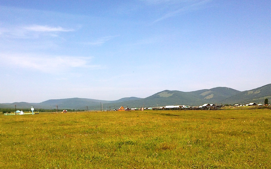 улус Мыла и субурган